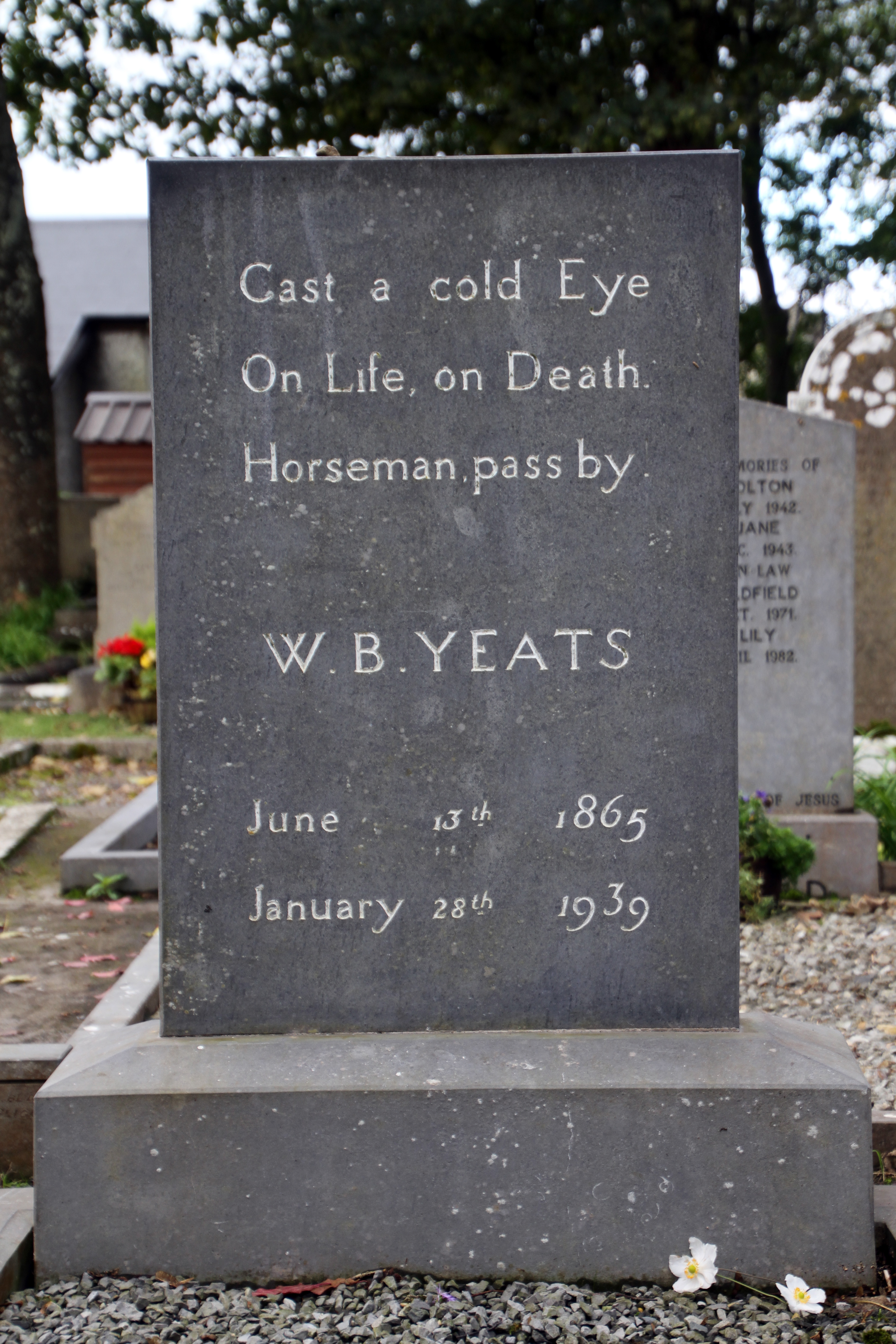 Drumcliff